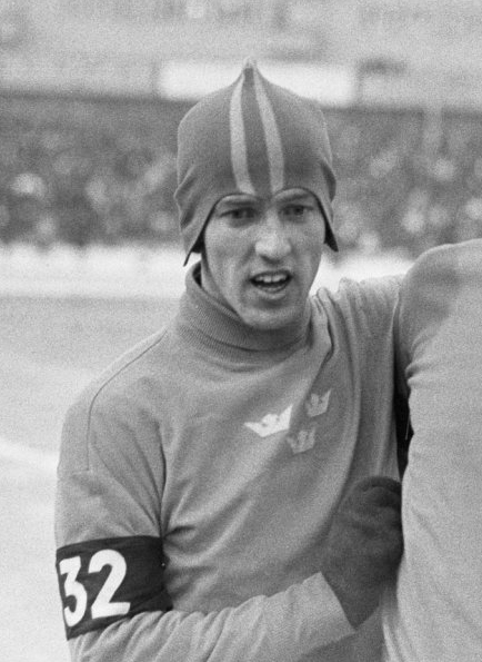 WK allround 1967: Jonny Nilsson.